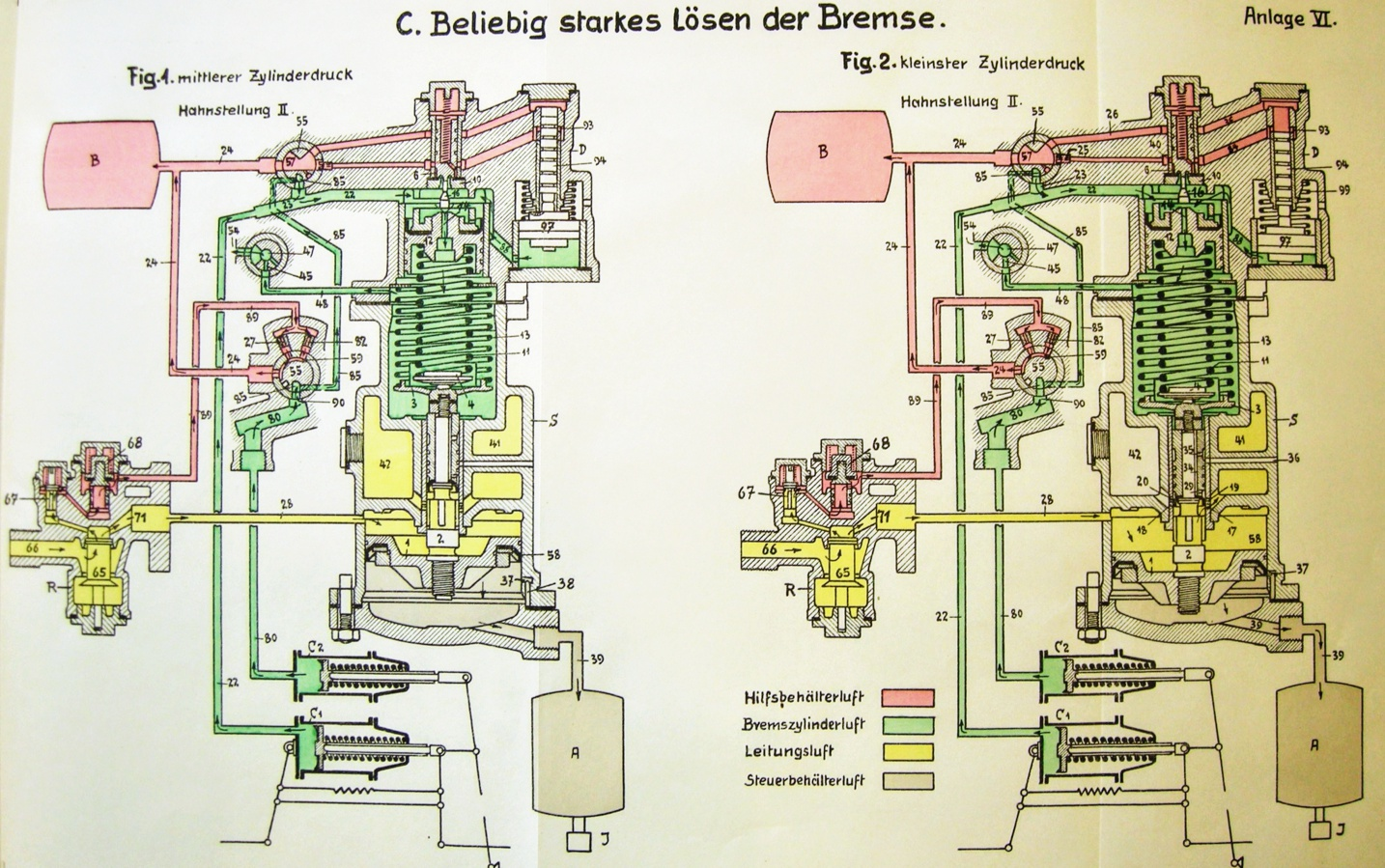 Funktionsprinzip der Drolshammer-Bremse (Quelle: Ehemalige Schulungsunterlagen der SBB)